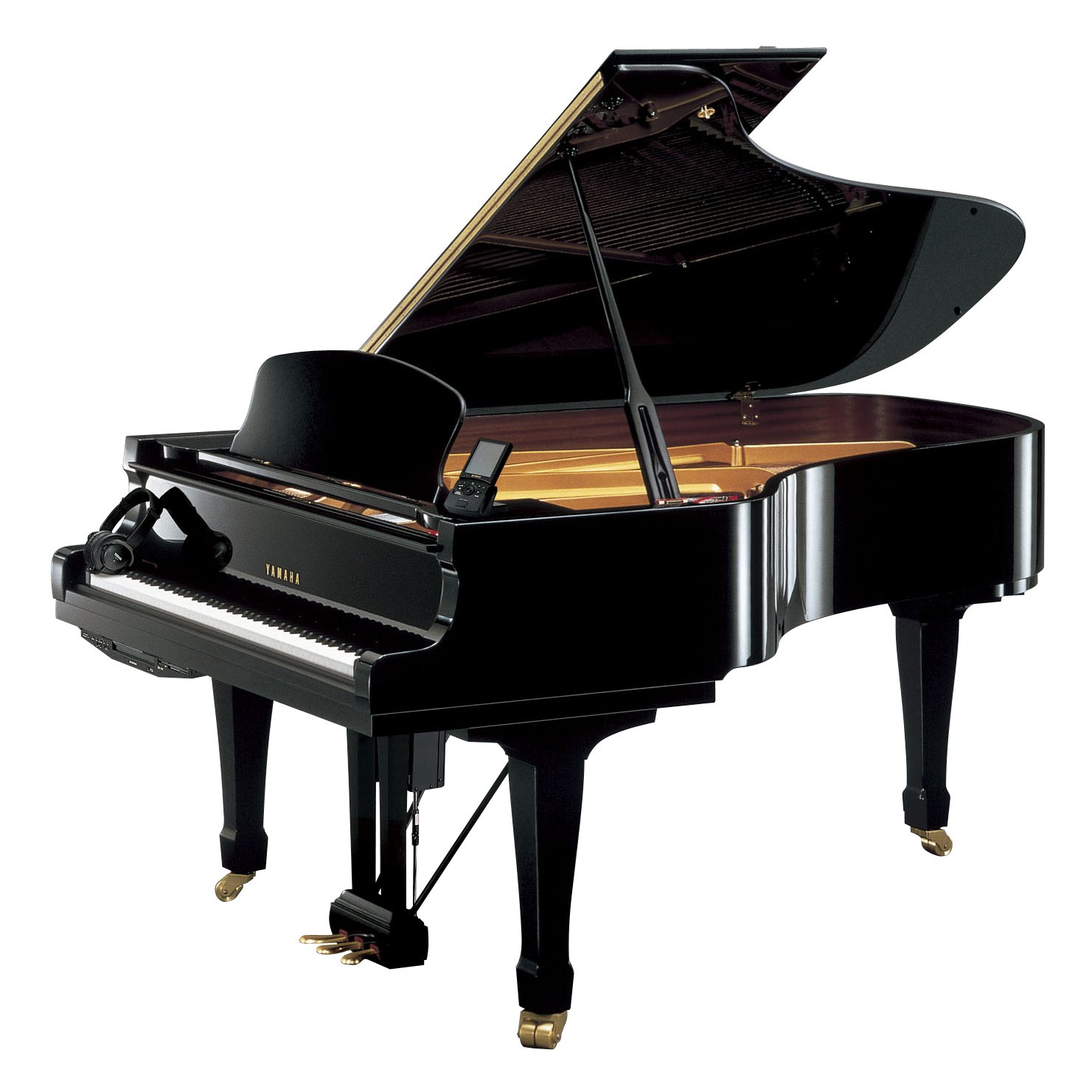 Дисклавир Yamaha DS6M4PRO PE